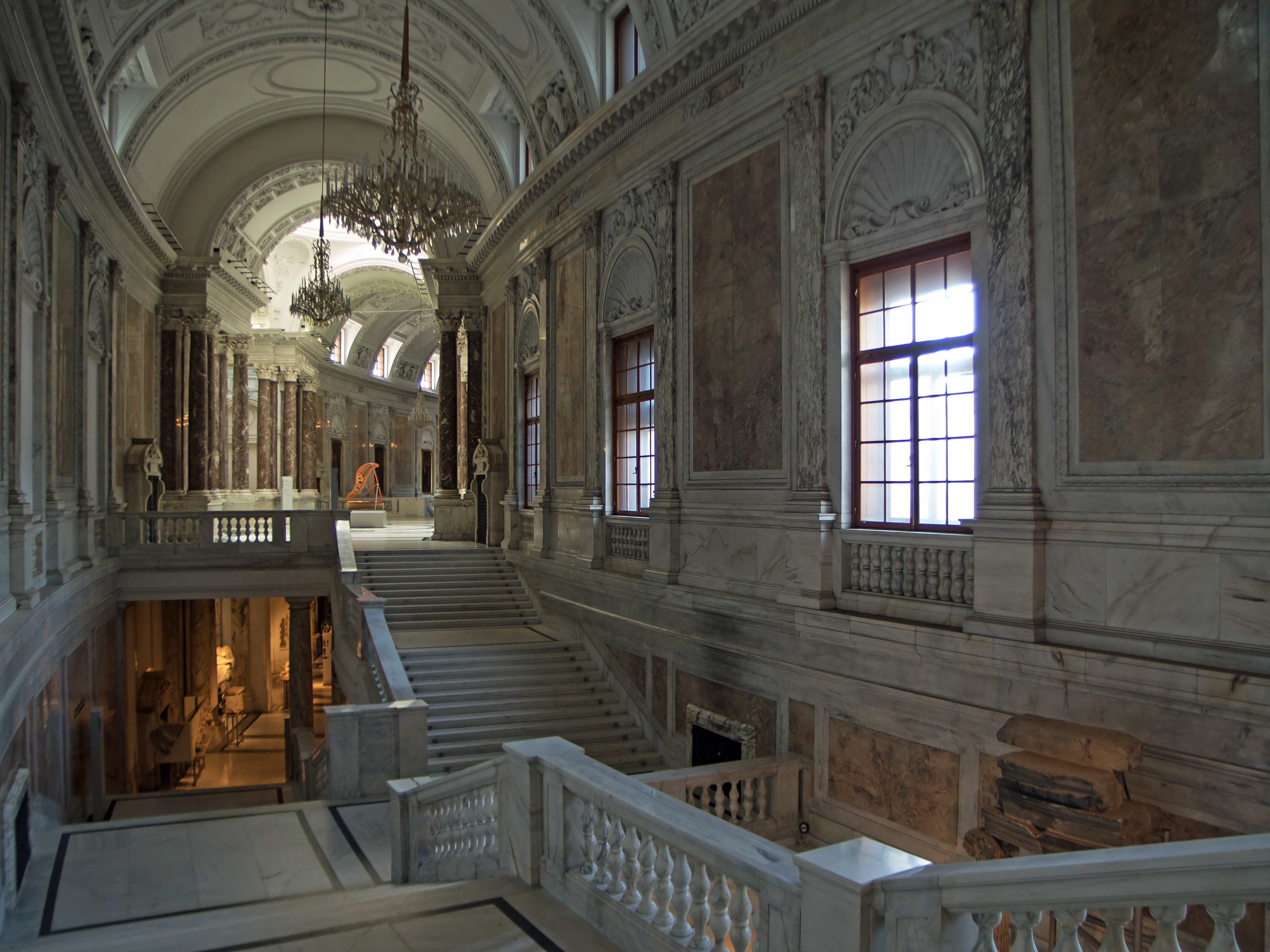 Hofburg (Neue Burg), die das Haus der Geschichte Österreich (HGÖ) beherbergen wird: Zentrales Stiegenhaus vor der musealen Adaptierung.